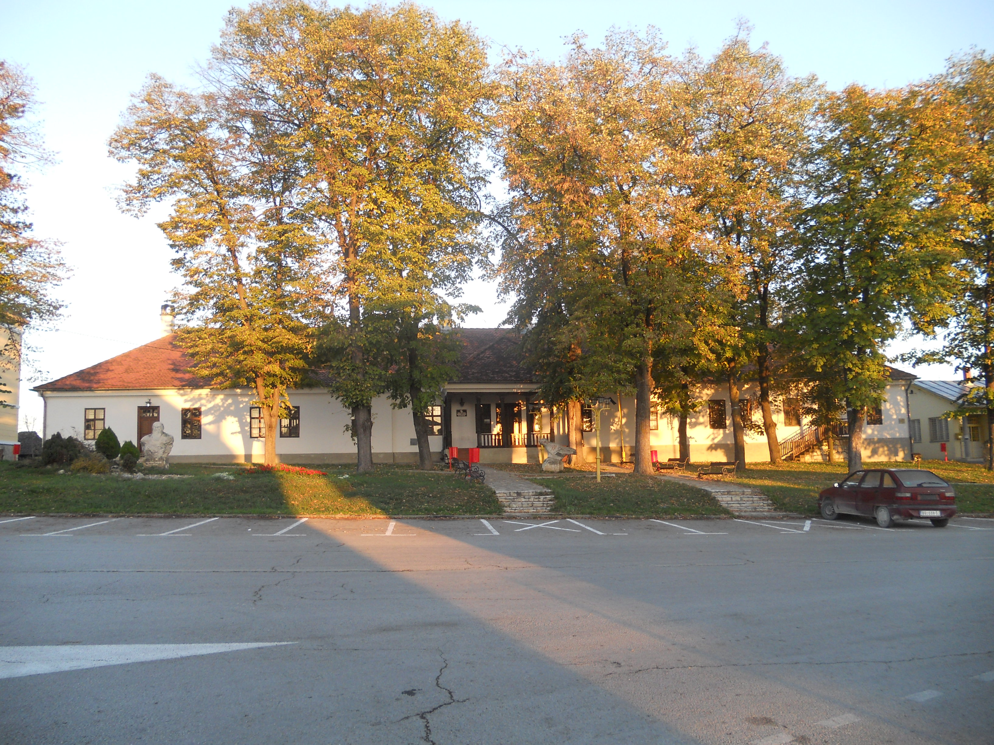 Konak u Vladimircima